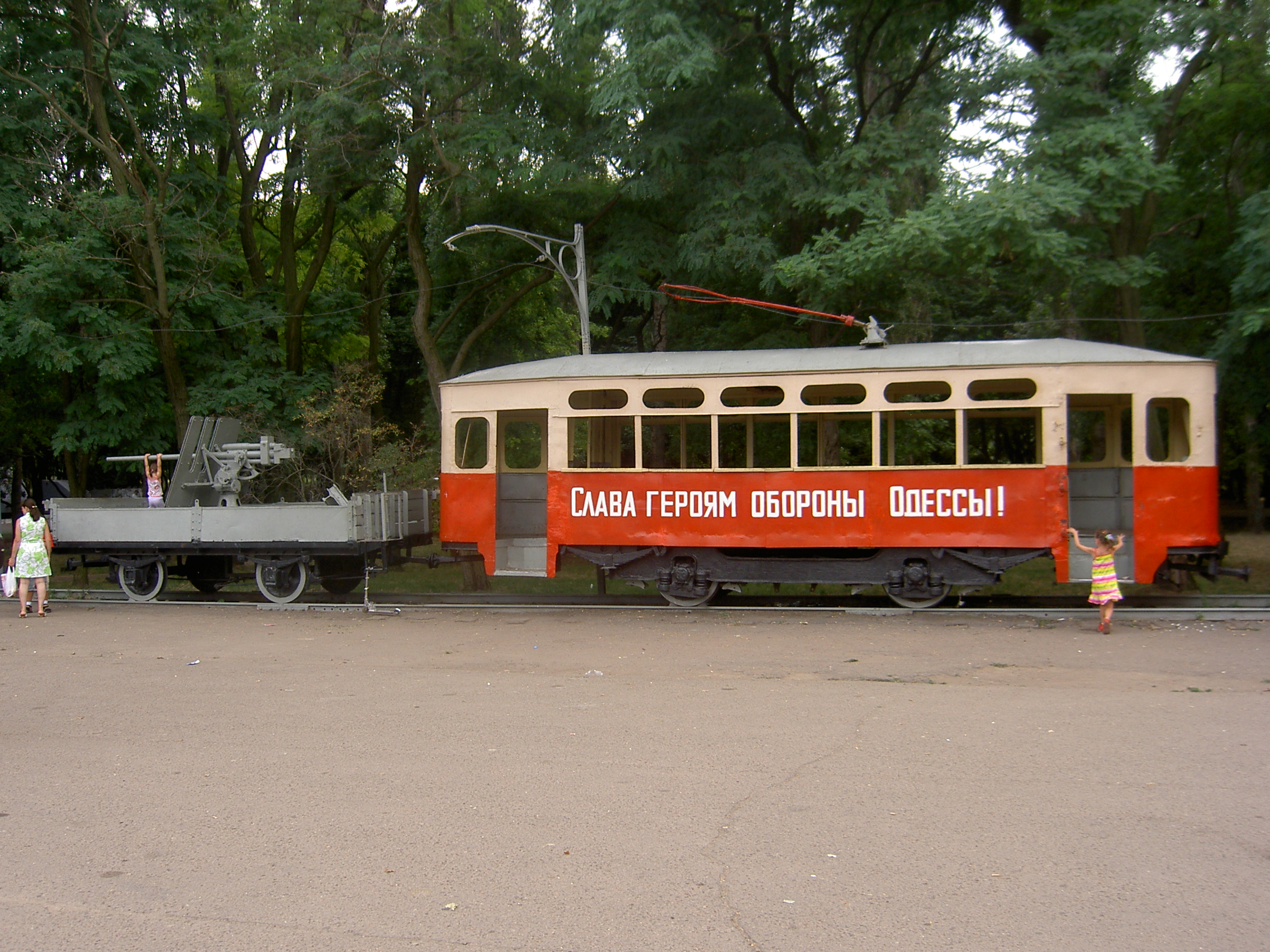 Muzeum partyzánské slávy v Oděse